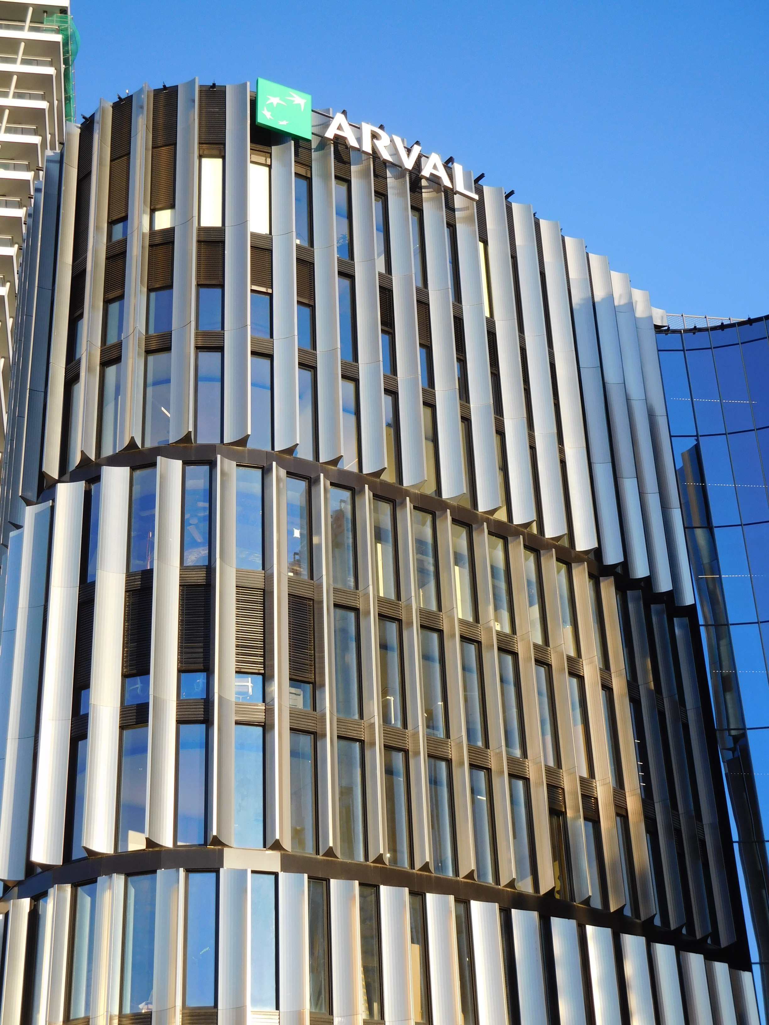 Praha - Pankrác, Milevská - Main Point Pankrác